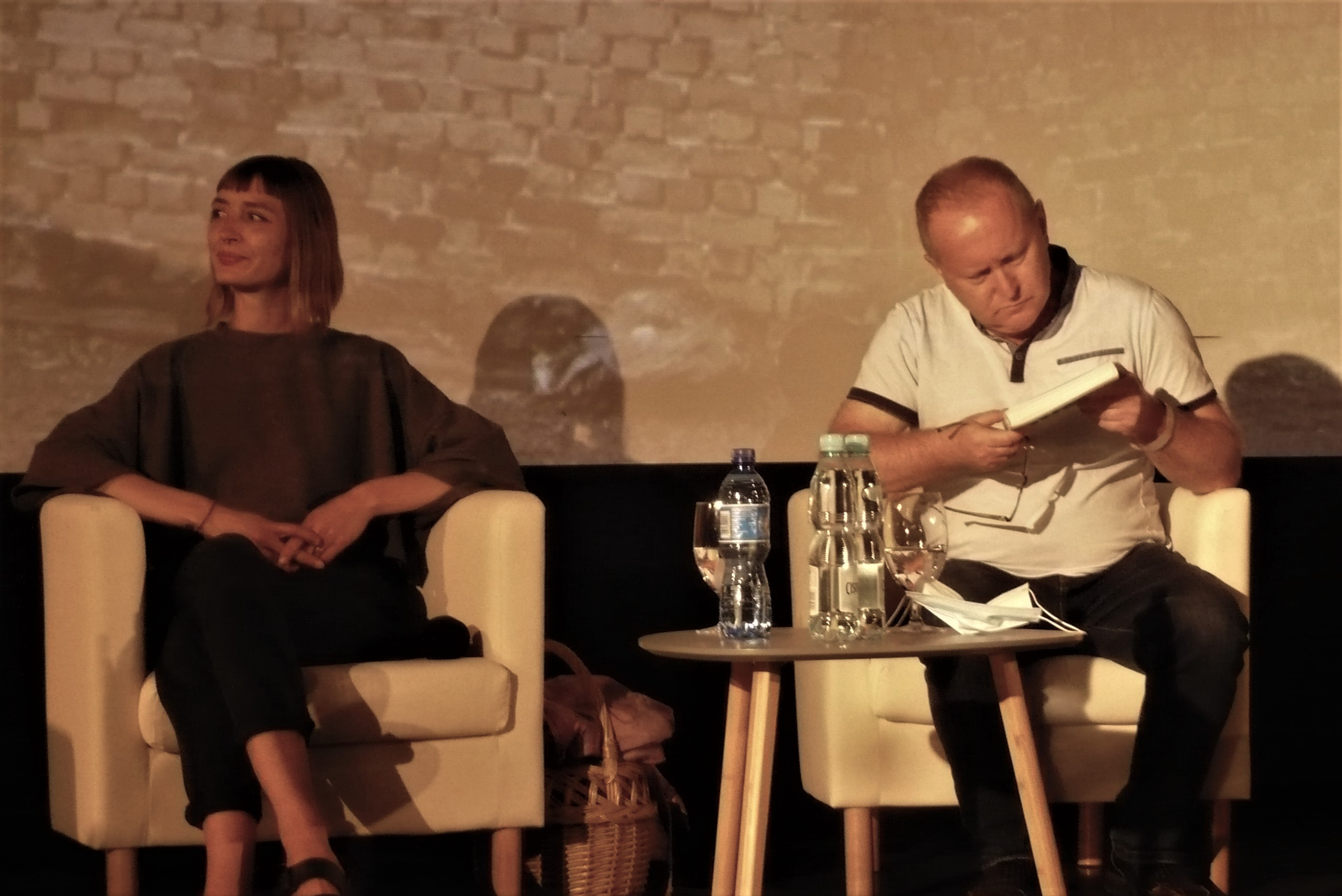 Ilona Witkowska, Karol Maliszewski, "Nieswojość", VI Festiwal Góry Literatury, Nowa Ruda, 2020